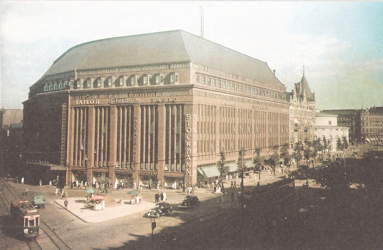 Stockmannin tavaratalo 1930-luvulla.